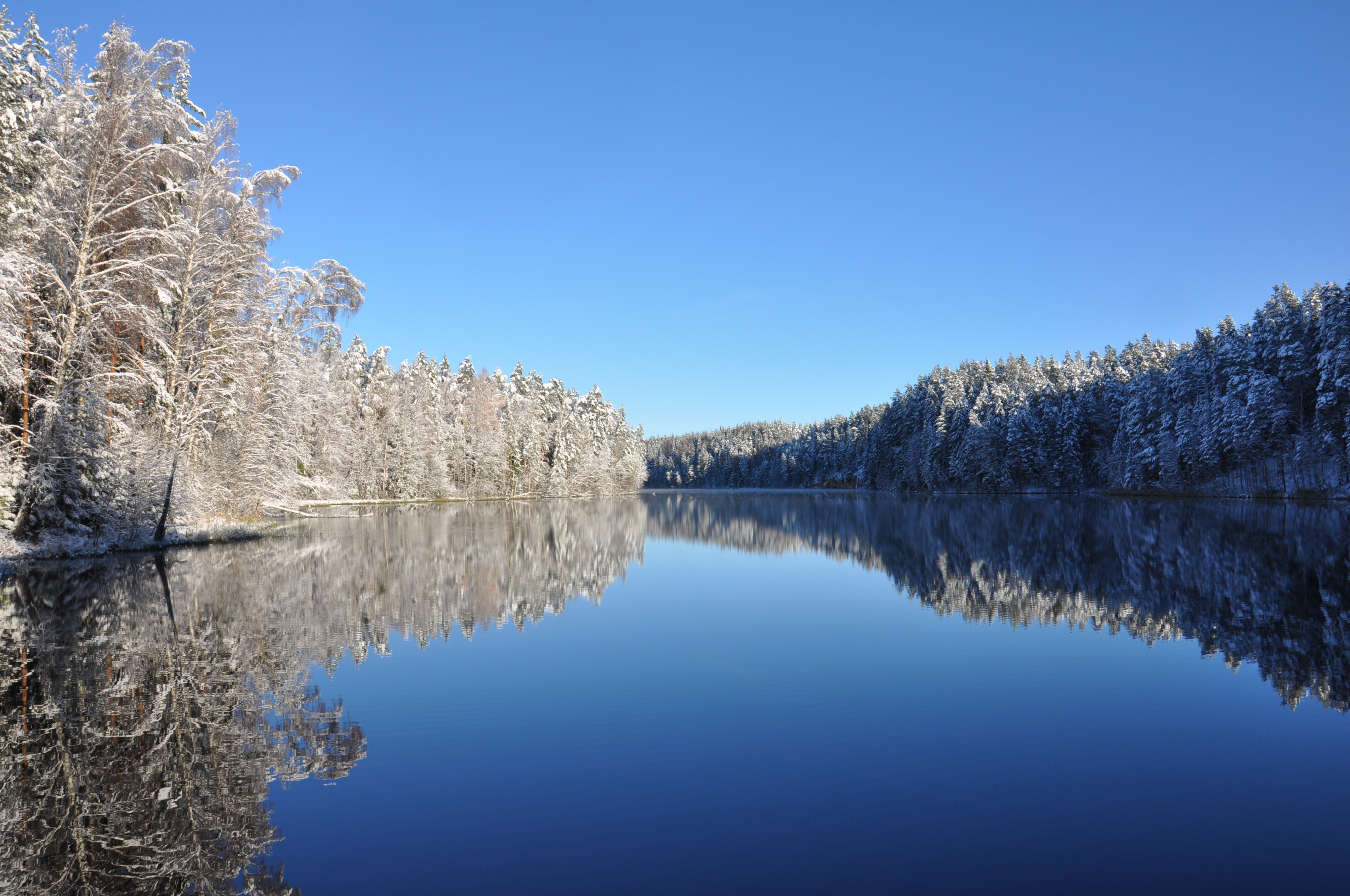 Saesaare paisjärv